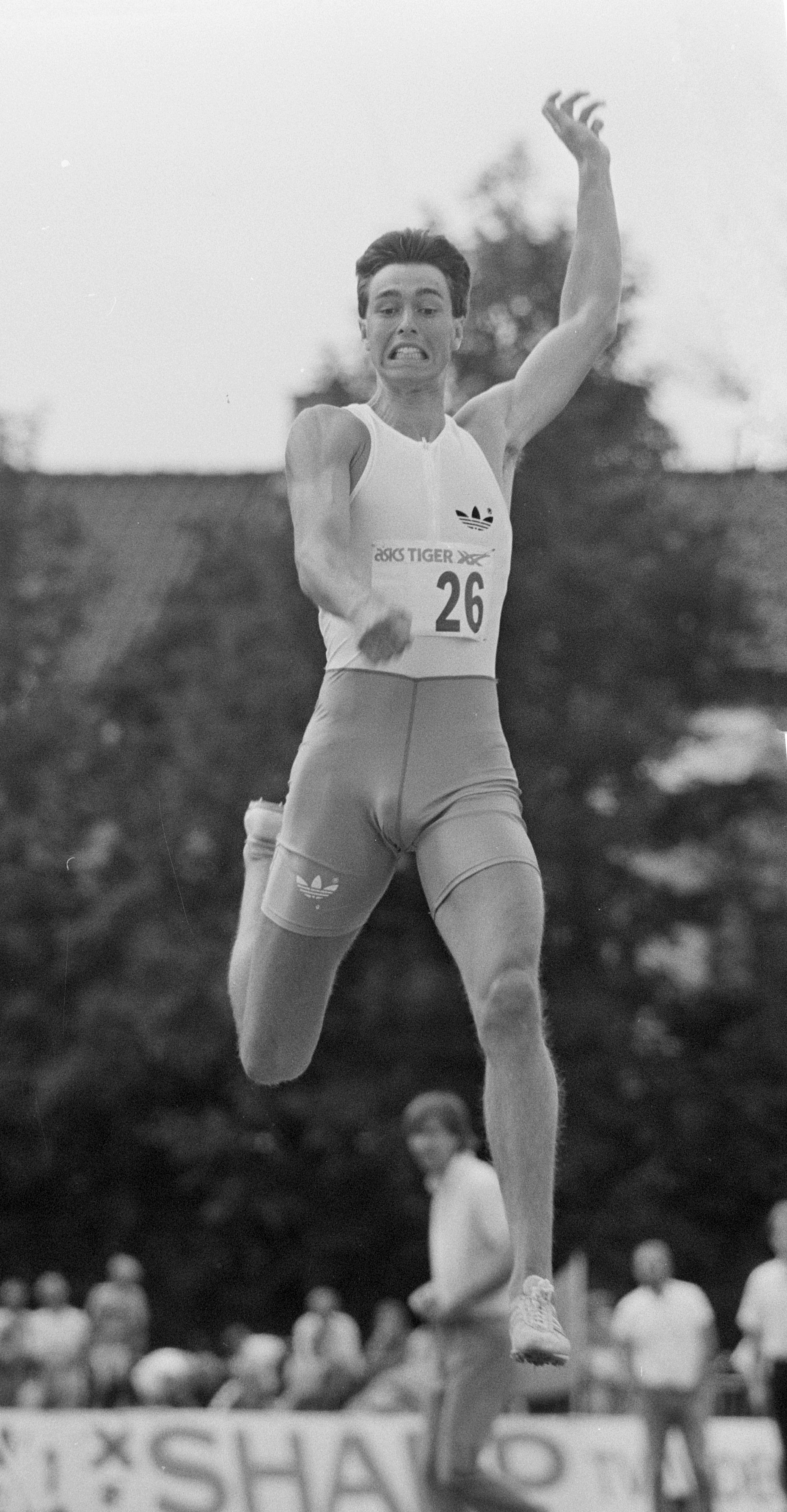 NK atletiek; Emiel Mellaard wint verspringen.